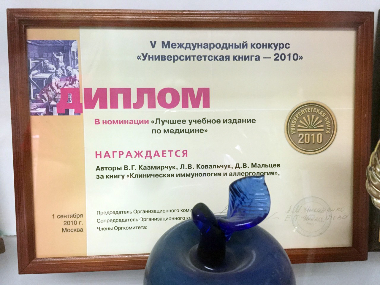 Підручник Казмірчук В.Г., Ковальчук Л.В., Мальцев Д.В. Клінічна імунологія і алергологія (рос. мовою) представляв Україну на V Міжнародному конкурсі "Університетська книга — 2010" у Москві і став переможцем у номінації "Краще навчальне видання з медицини"